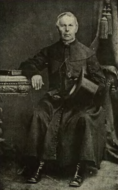 Zdjęcie przedstawia ks. Kacpra Kotkowskiego (1814-1875). Data jego zrobienia jest nieznana.